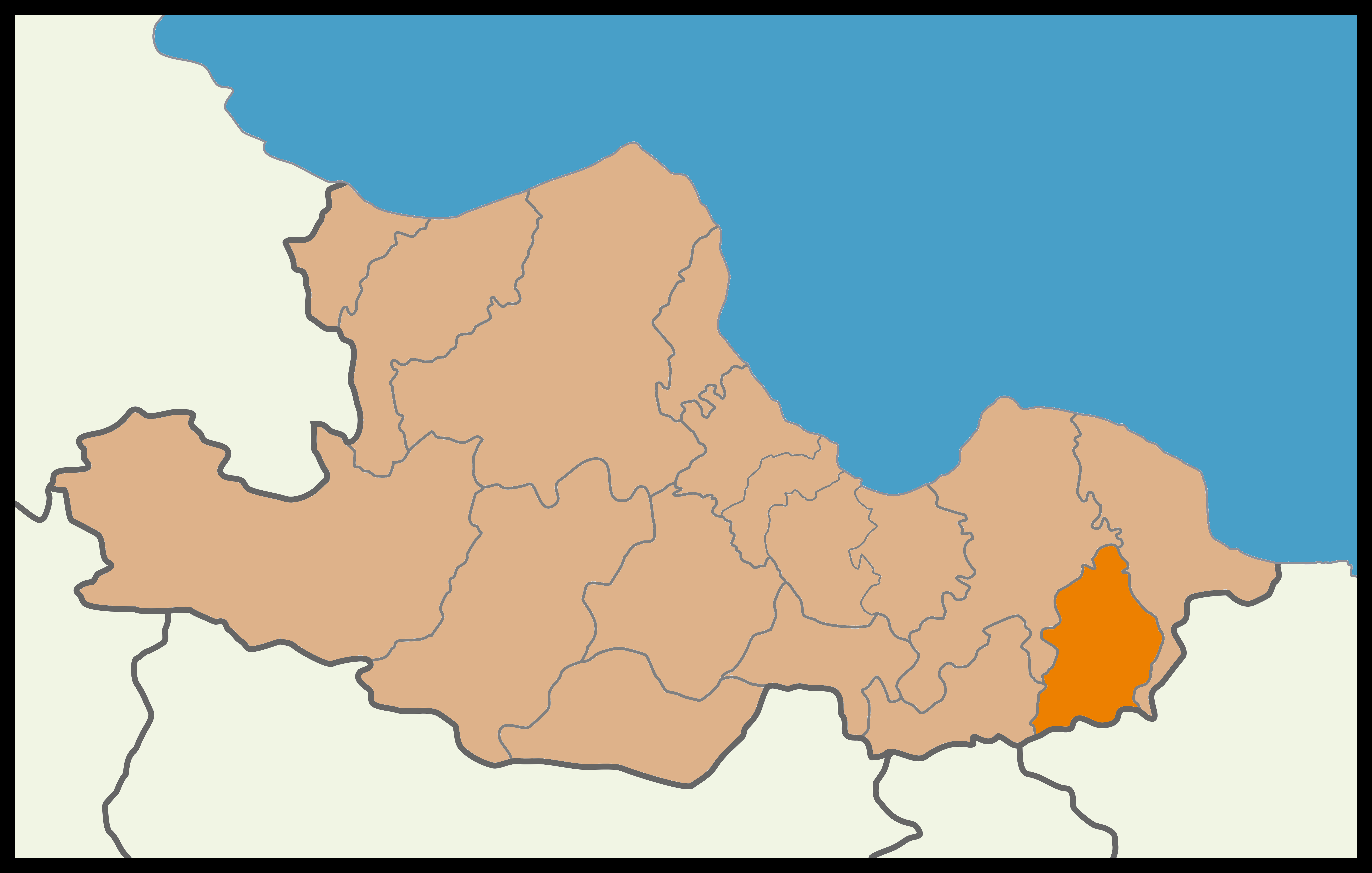 Samsun'un Salıpazarı ilçesinin 2014 Türkiye yerel seçimleri haritası.